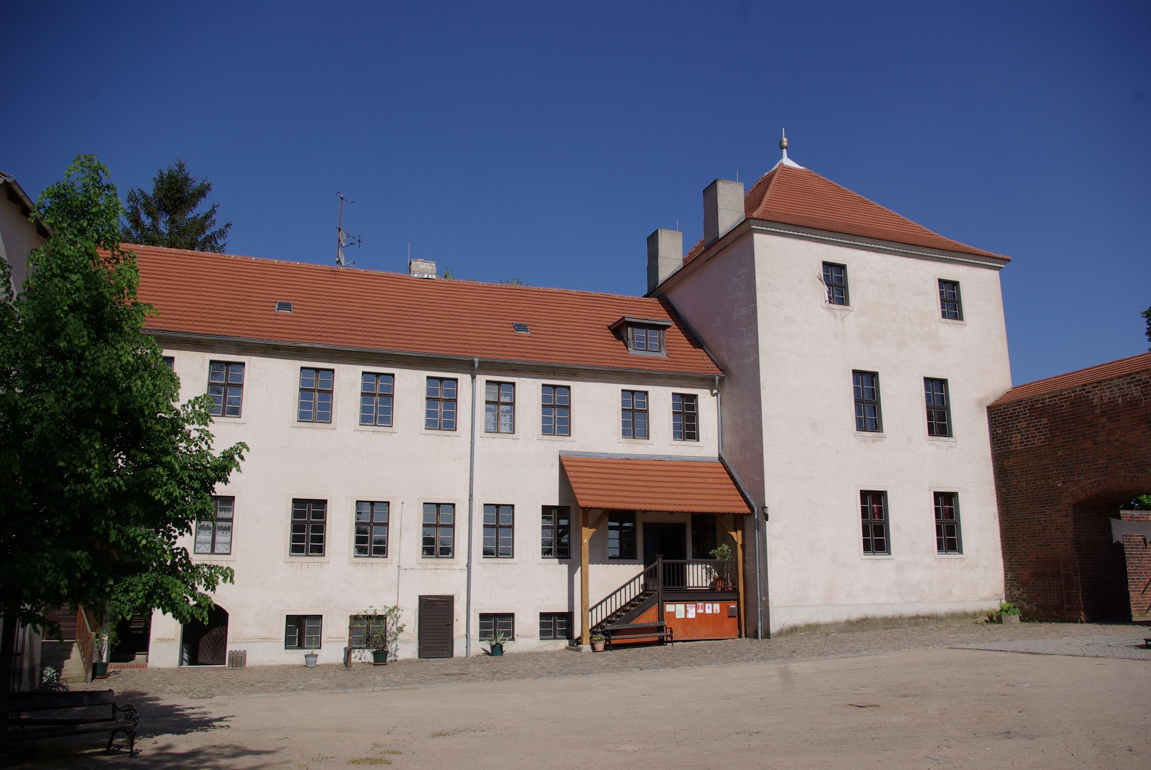 Friedland, Niederlauzitz in Brandenburg. Die Burg im Ort steht unter Denkmalschutz. Der Blick geht auf die Gebäude vor uns der Hof der Burg.